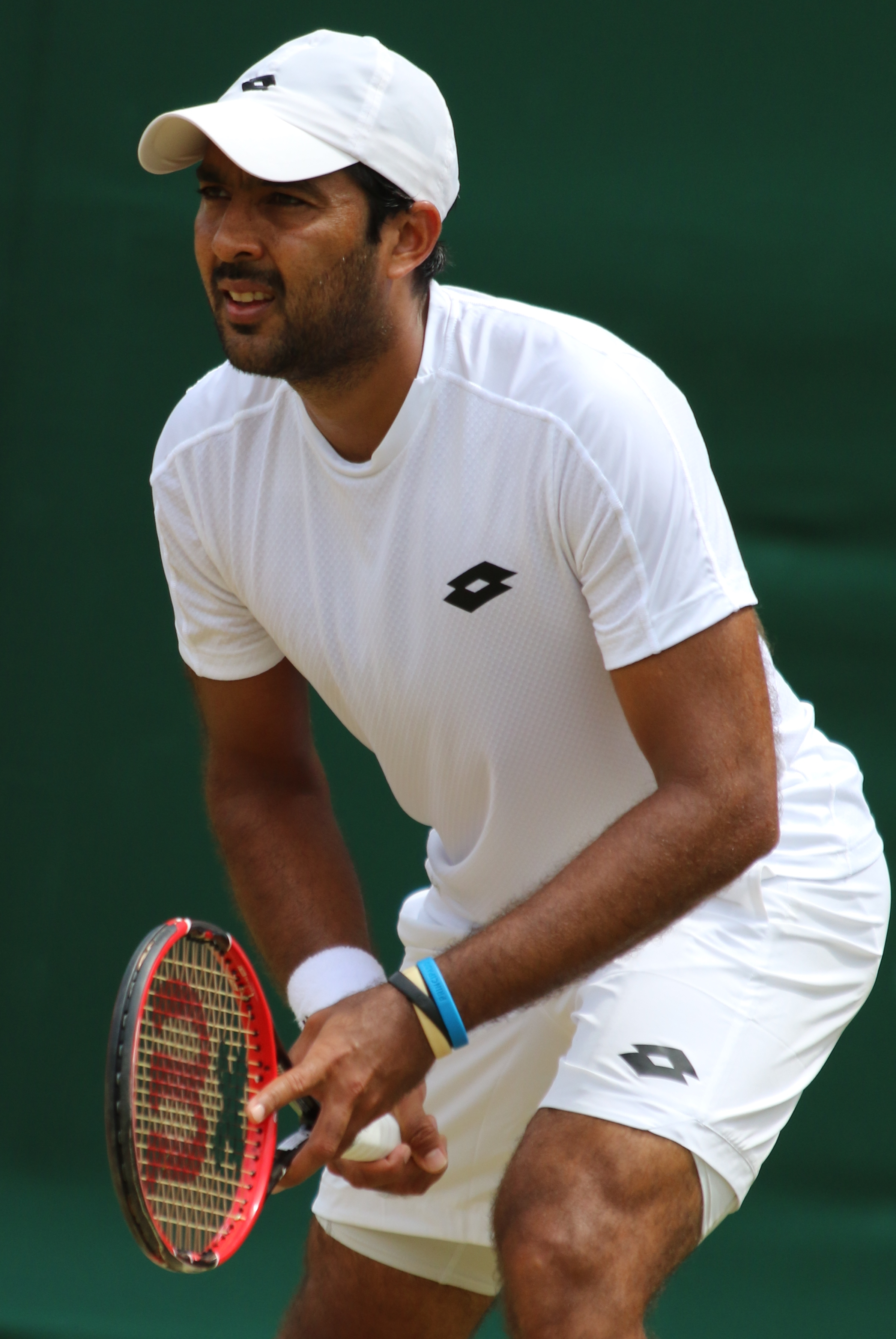 Qureshi WM17 (10)